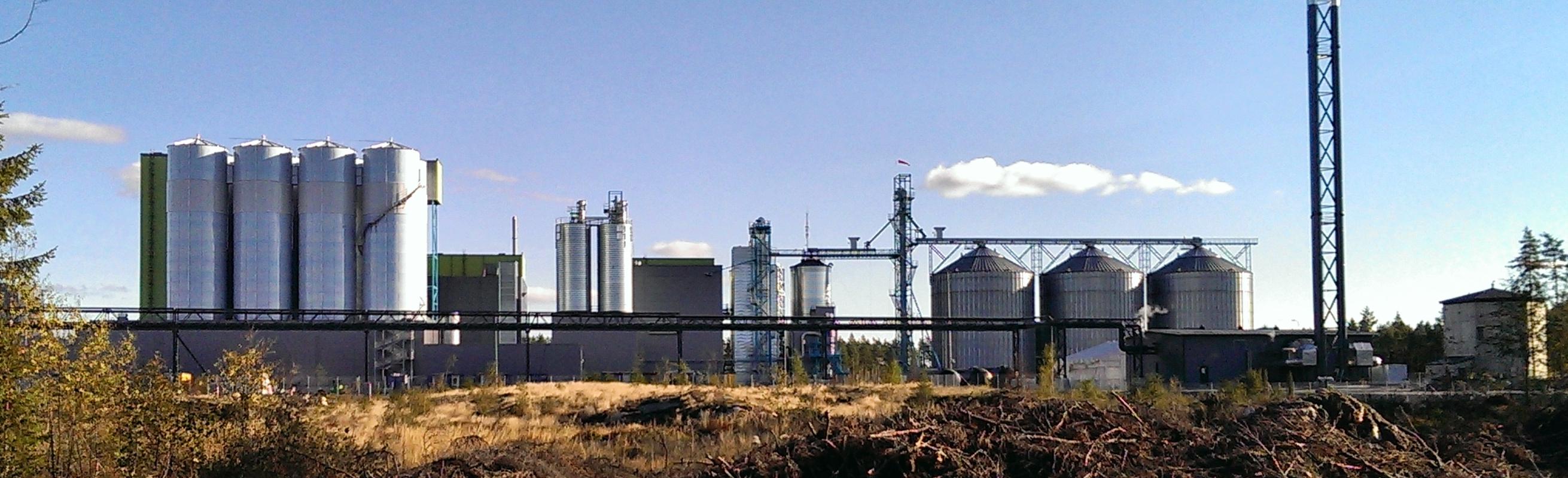 Uudenkaupungin soijatehdas 2013